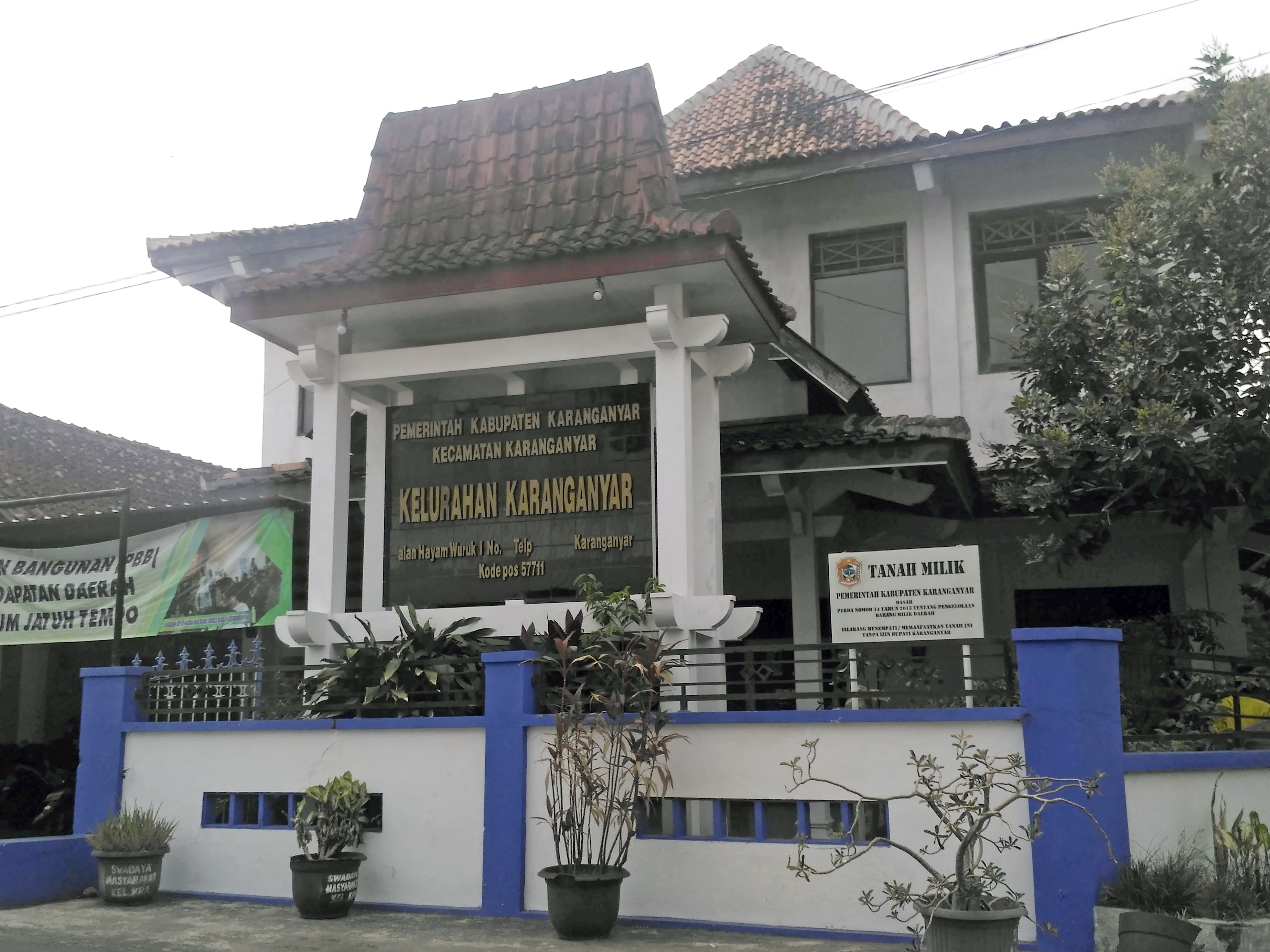 sumber : aryphrase ✉ 20 November 2017 12.18 (UTC)